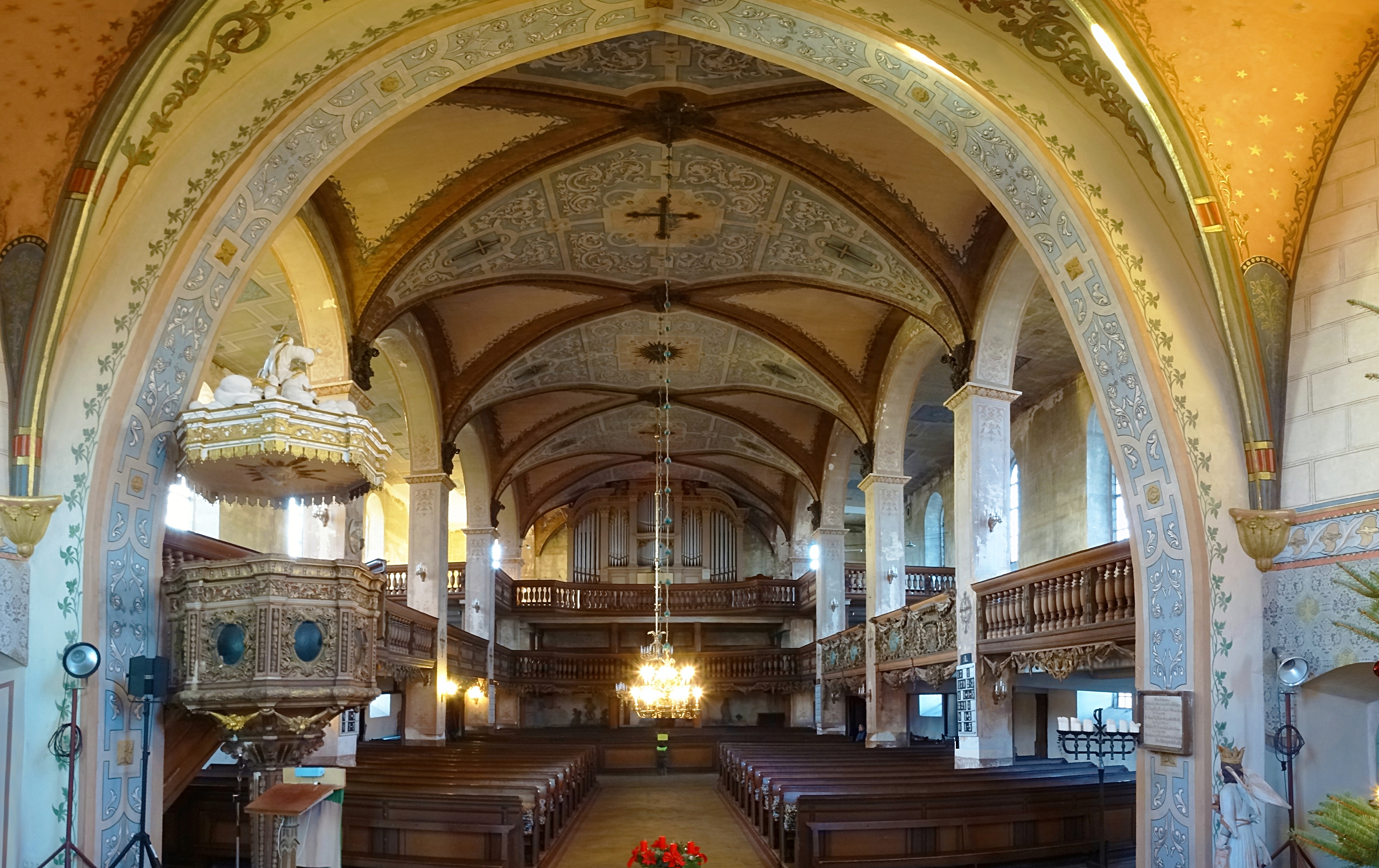 Das imposante Kirchenschiff aus der Barockzeit mit klassizistischen Zügen bietet ca. 1000 Sitzplätze. Die Kanzel (1709) stammt vom Bildhauer Schwanhold aus Kindelbrück.